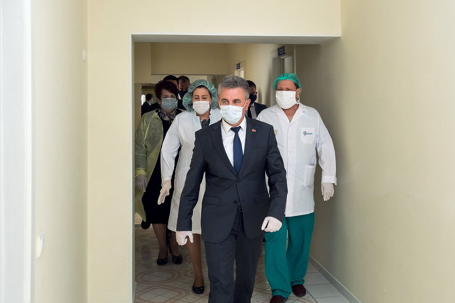 Президент Приднестровья Вадим Красносельский посещает больницу во время пандемии COVID-19